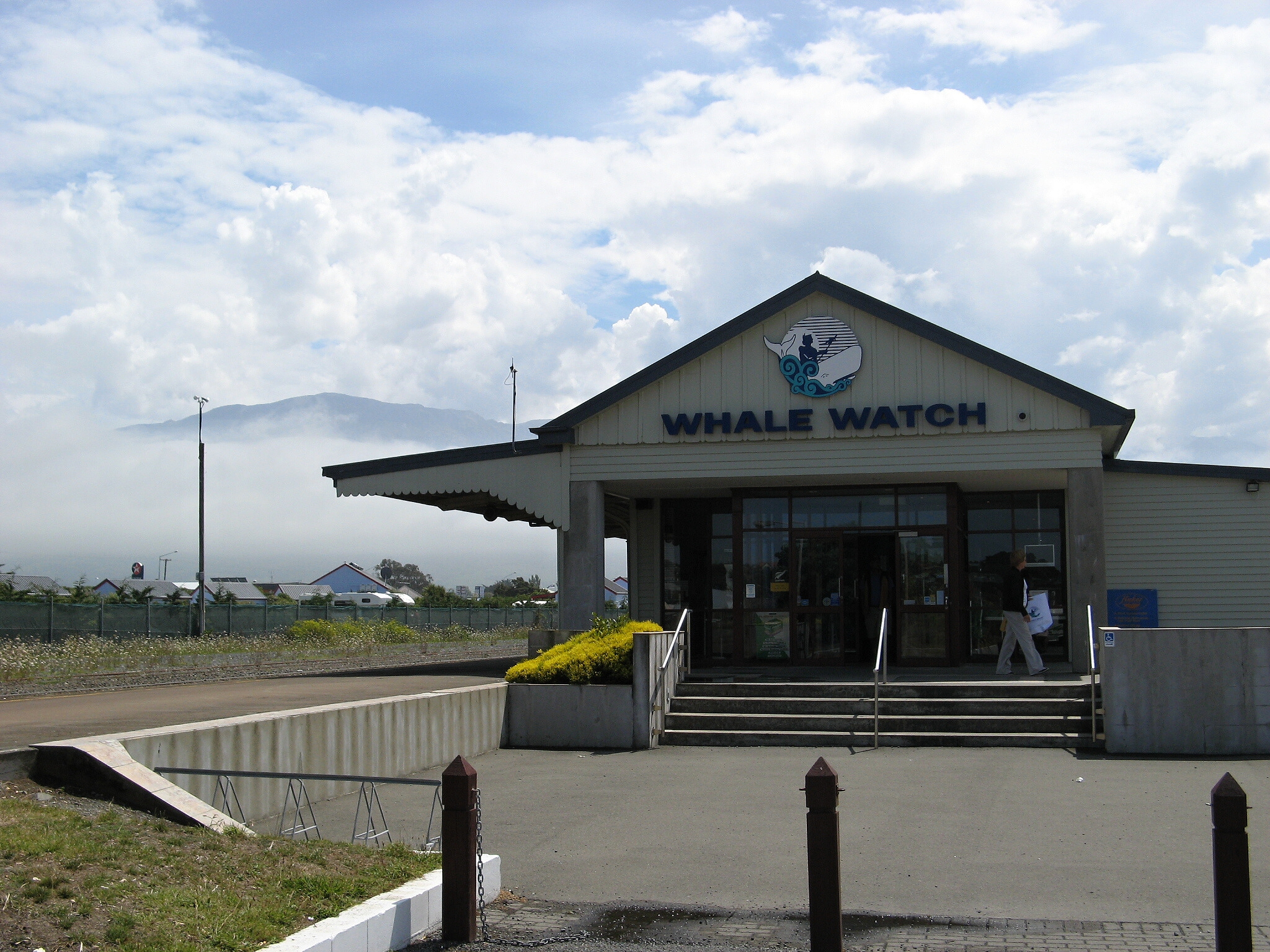 Kaikoura - bývalé nádraží, nyní centrum výletů za velrybami